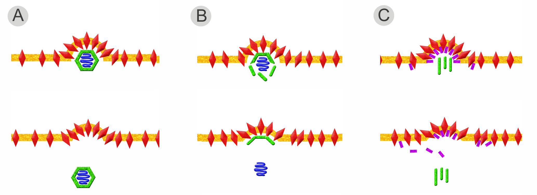 Verschiedene Mechanismen der Knospung eines Virus an einer Lipid-Doppelmembran: Lipidmembran (gelb), Hüllproteine (rot), Kapsidproteine (grün), Nukleinsäure (blau), Matrixproteine (violett)